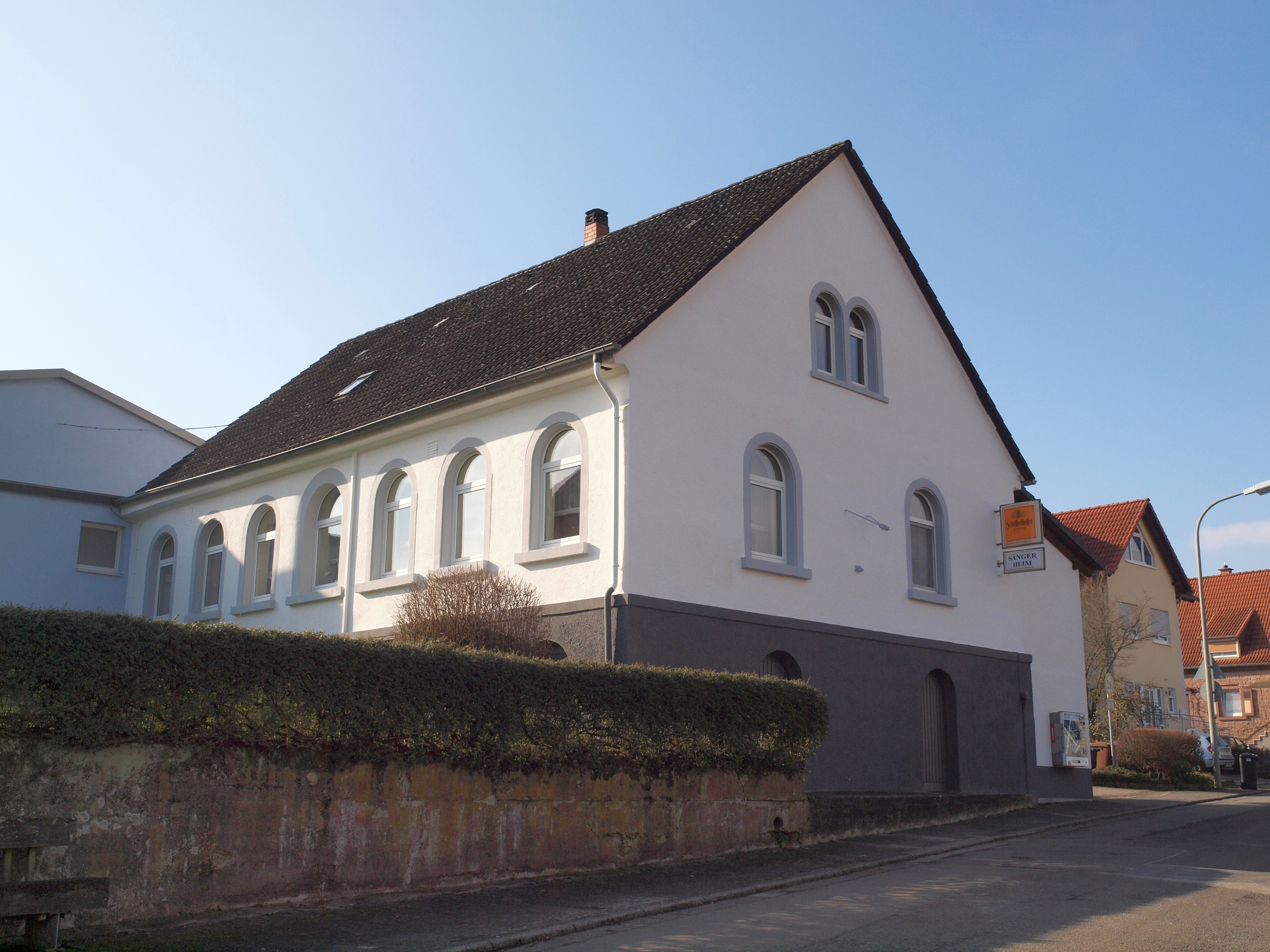 Altes Schulhaus, Schulstraße 7, Erzenhausen